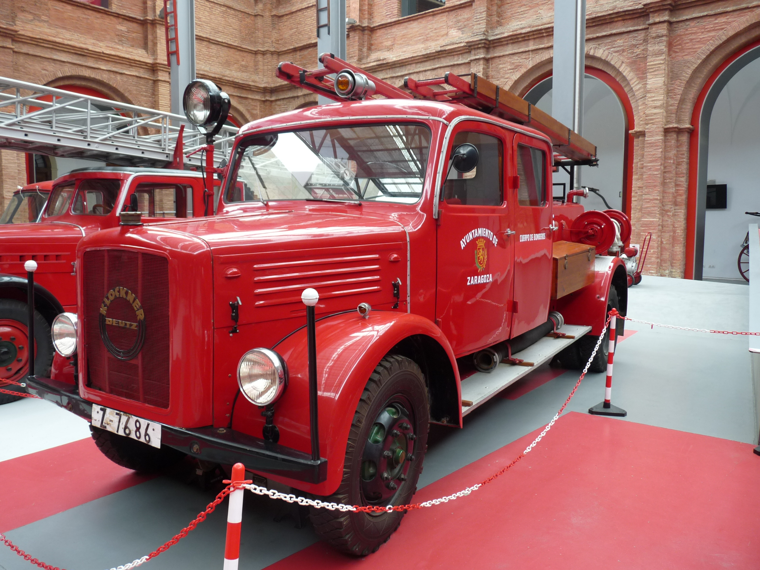 Zaragoza - Museo Bomberos - Camión autotanque T-5 Magirus-Deutz de 1942 - Fabricante: Klöckner-Deutz - Prestó servicio en el ayuntamiento de Zaragoza de 1942 a 1960